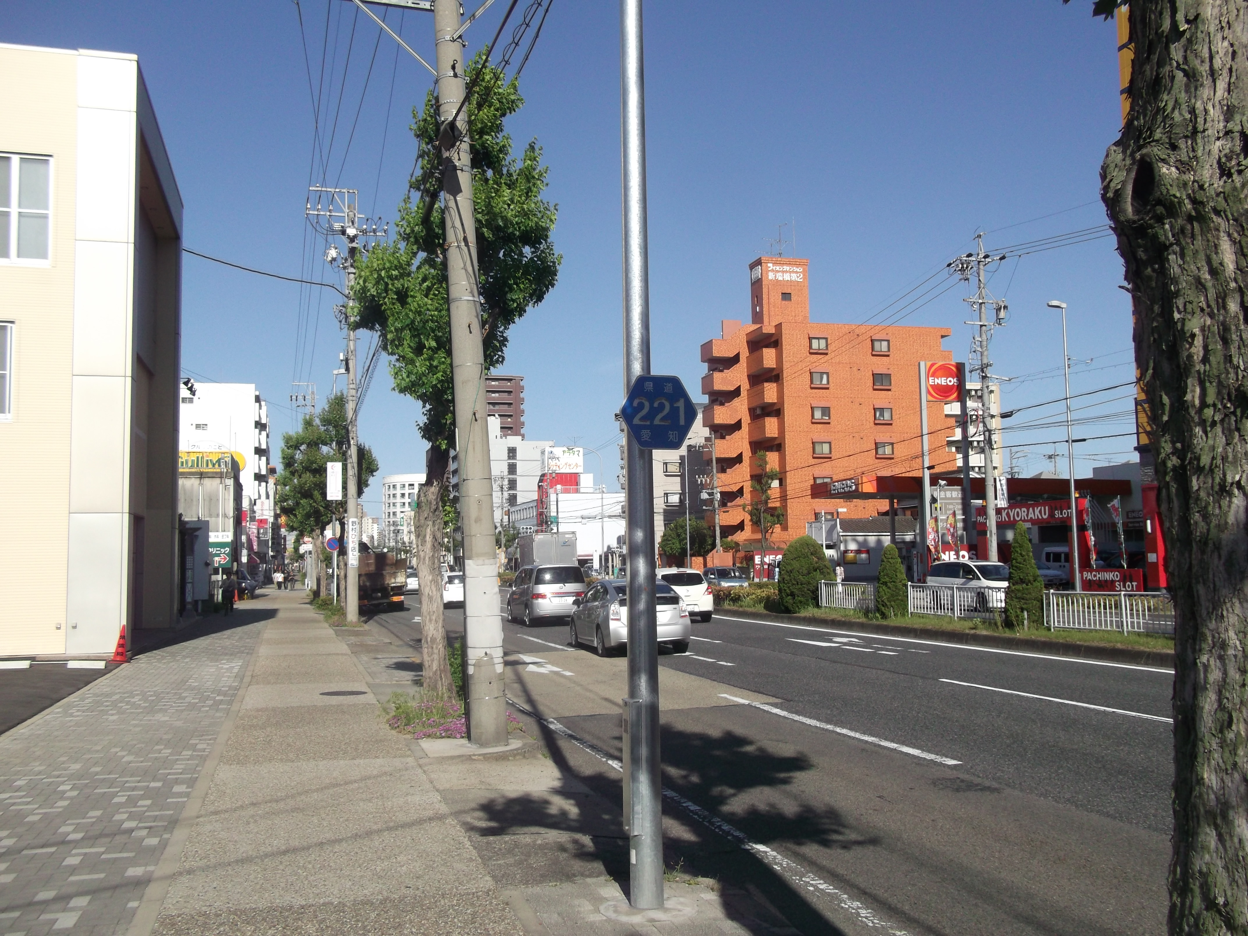 名古屋市瑞穂区妙音通の愛知県道221号を東側に向かって写す